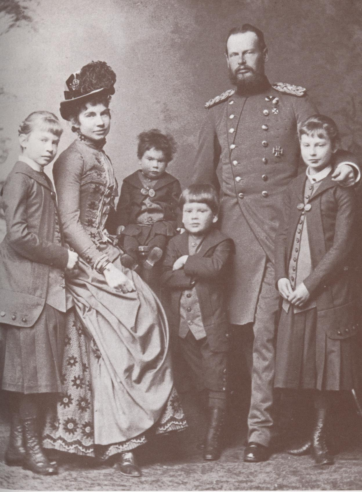 Prinz Georg von Bayern (Bildmitte stehend) mit Eltern und Geschwistern.Fotografie von Joseph Albert.[1]